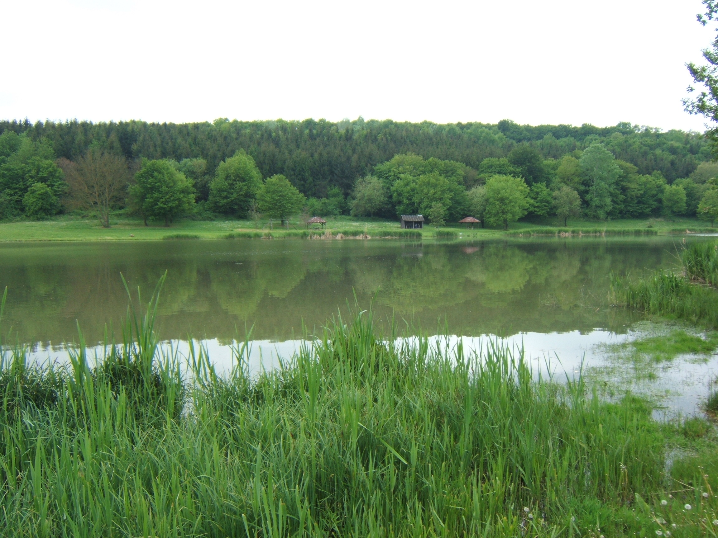 Szenyér, aradpusztai tó